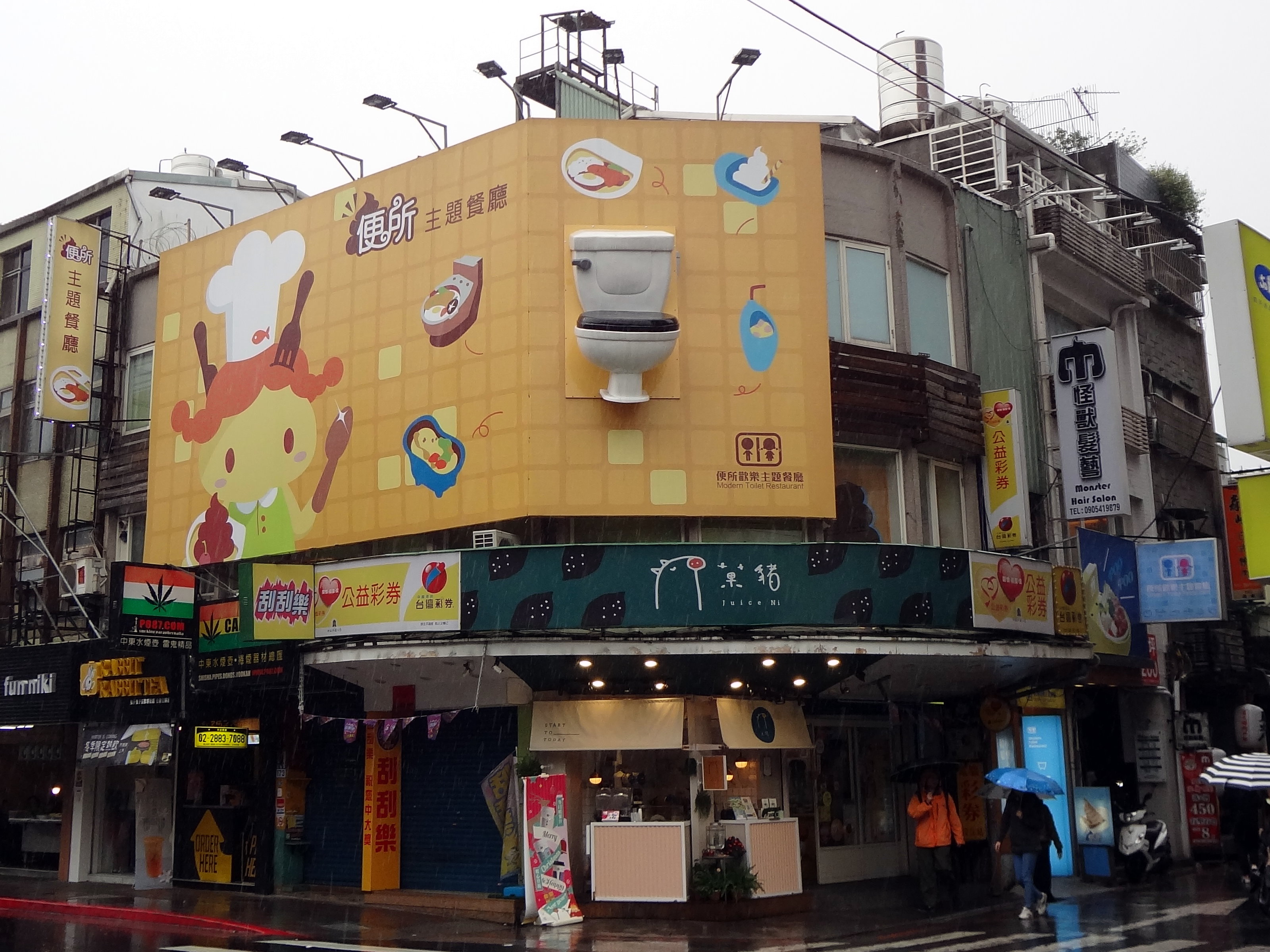 便所歡樂主題餐廳台北士林店，位於臺北市士林區文林路173號2樓，2017年搬入。